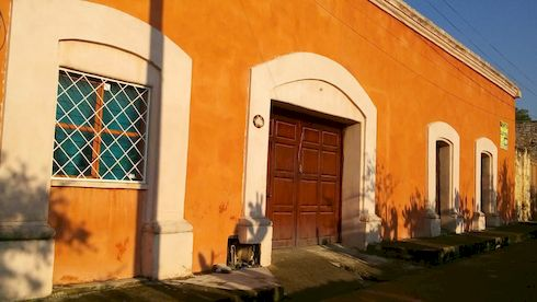 casa típica ( del finado Candelario De La Peña ) - Iturbide, Nuevo León, México